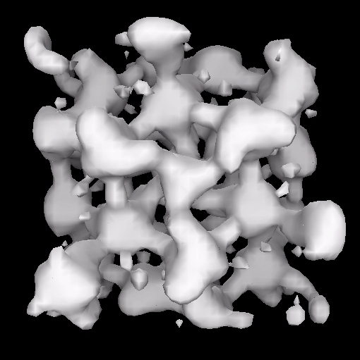 Dr. Gregor Overney